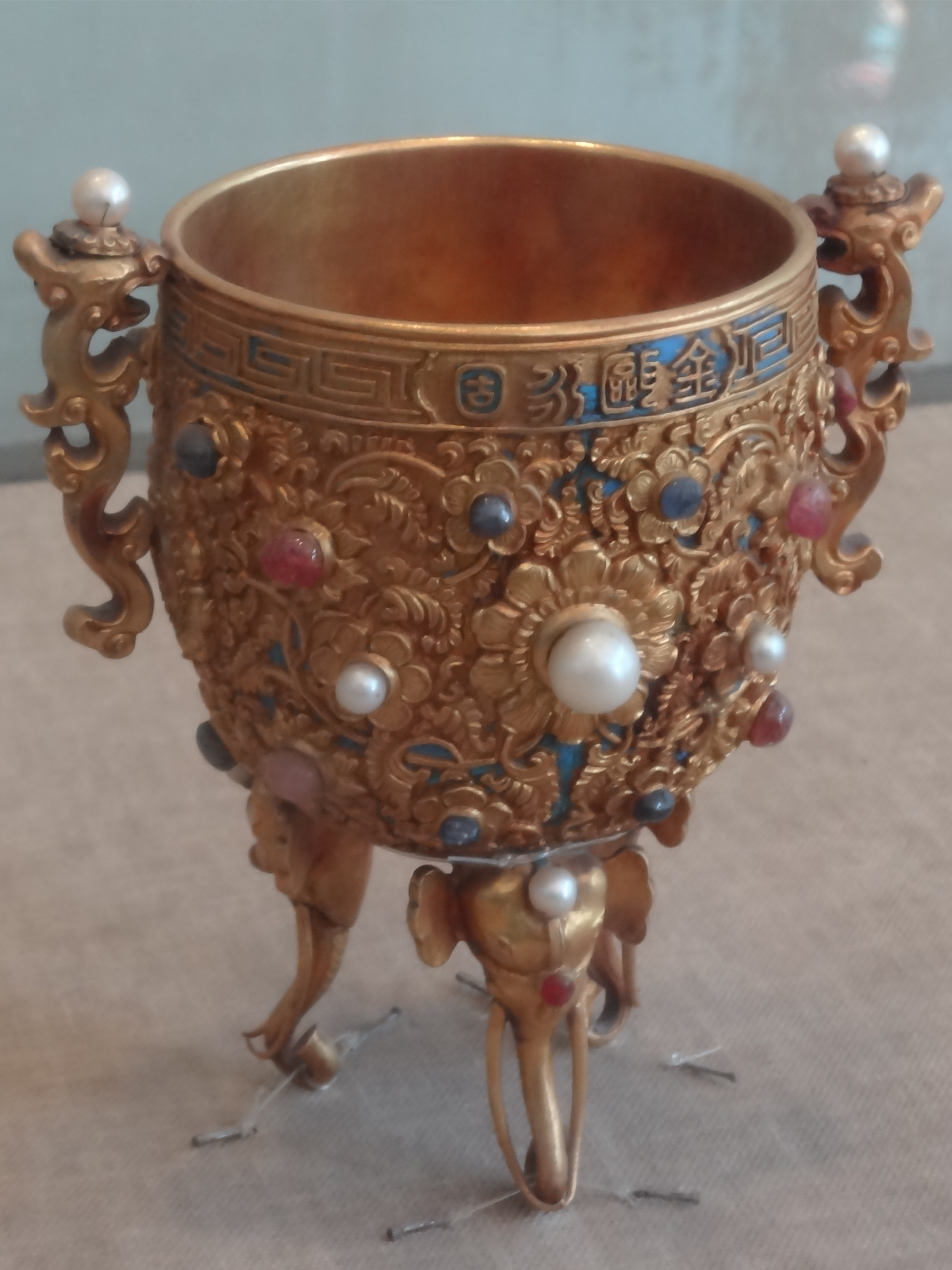 金瓯永固杯，收藏于北京故宫博物院珍宝馆